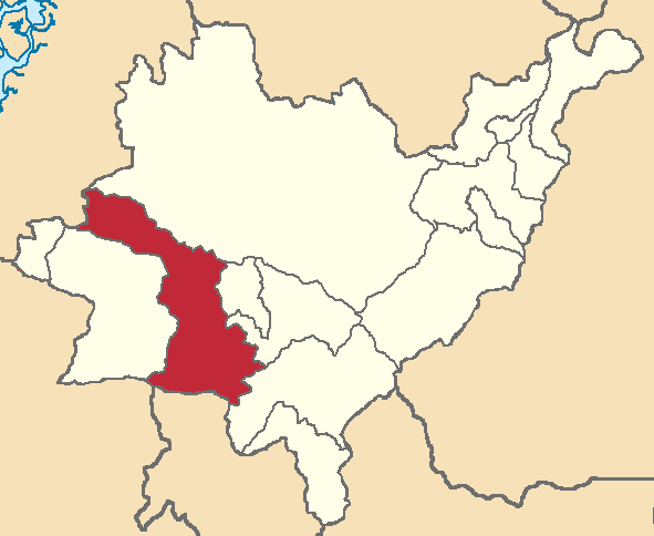 Mapa localizacor del cantón en Azuay, Ecuador